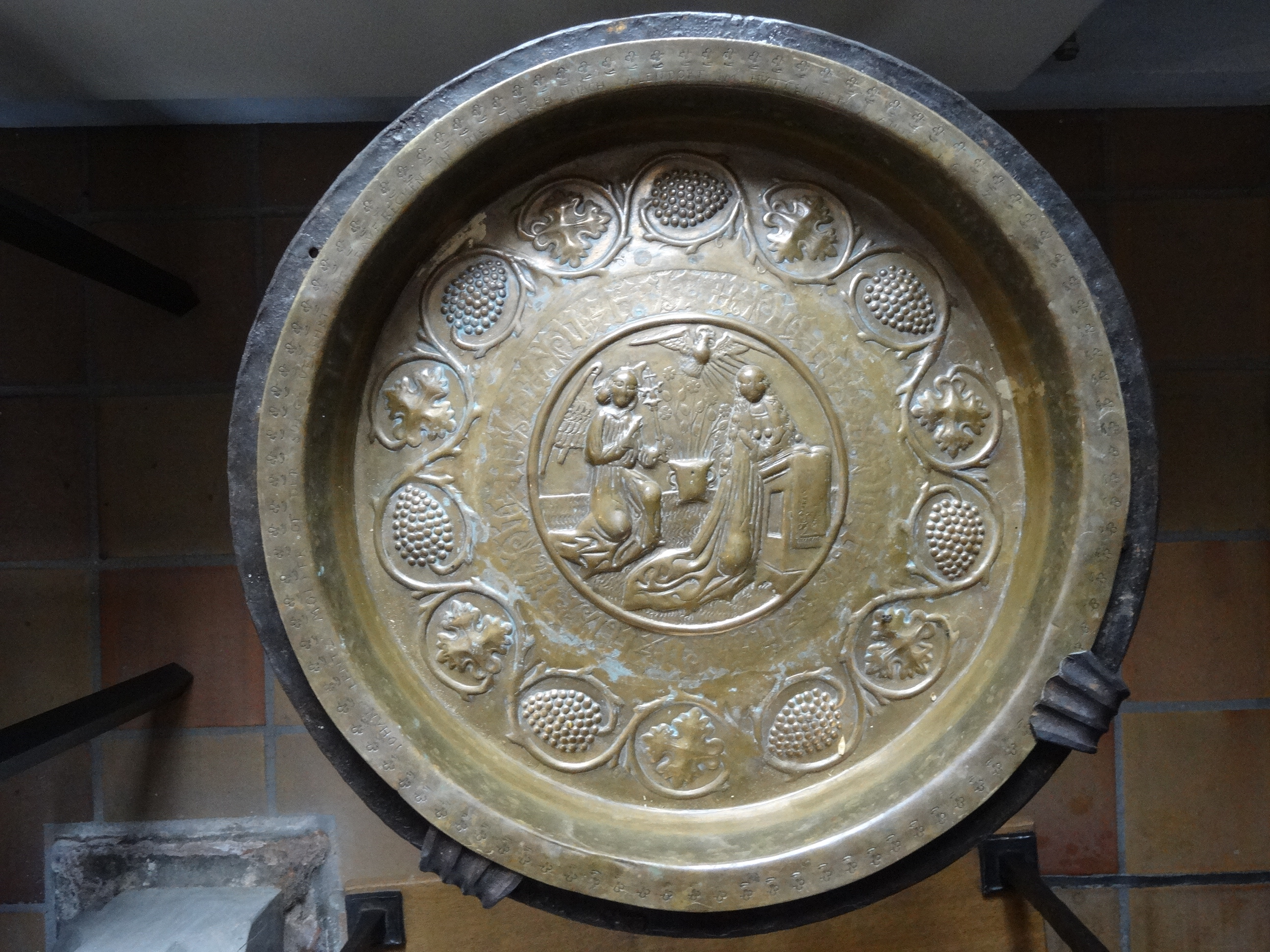 Taufschale von 1637, evangelische Kirche Allendorf/Lahn